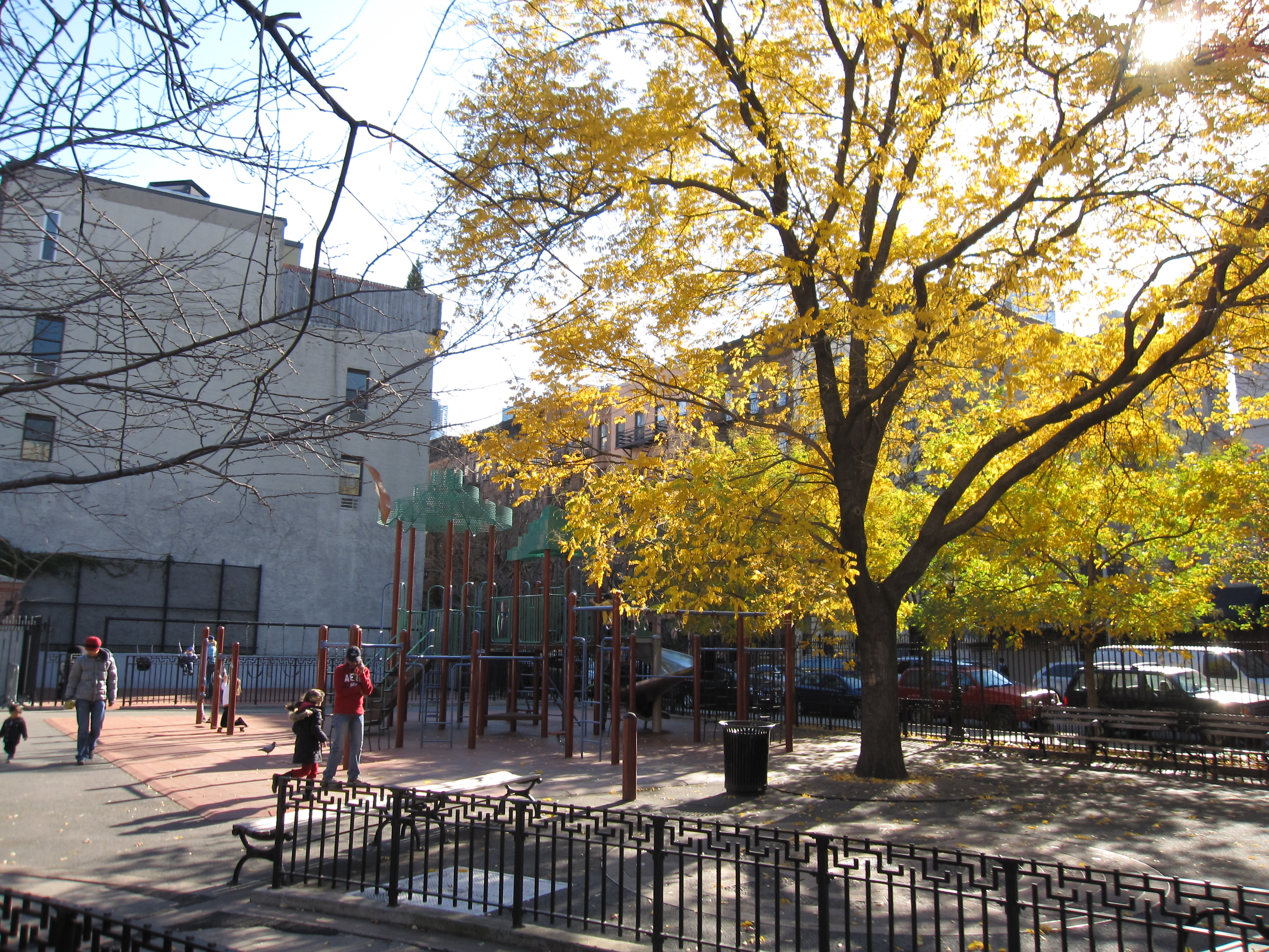 Hell's Kitchen Park